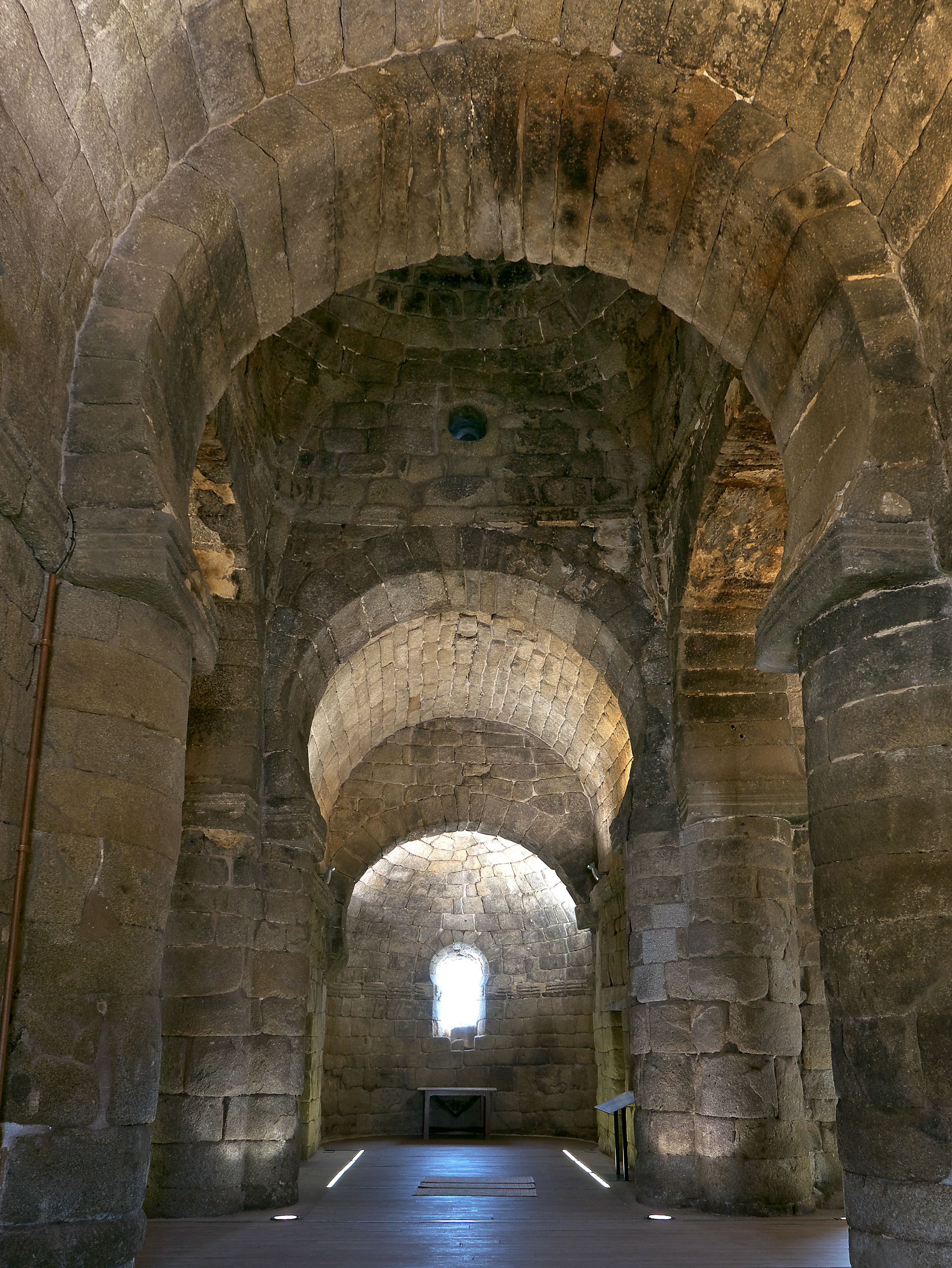 Cubierta totalmente abovedada, característica significativa en relación a su periodo artístico.